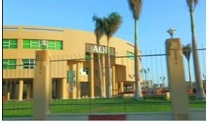 الجامعة العربية المفتوحة بمصر